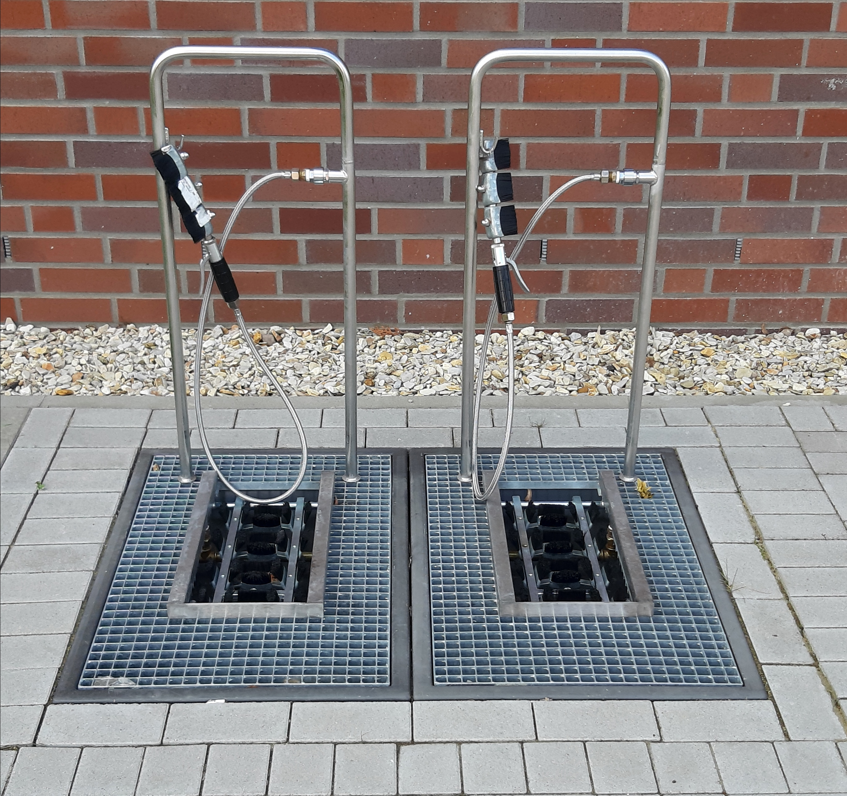 Stiefelreinigungsanlage